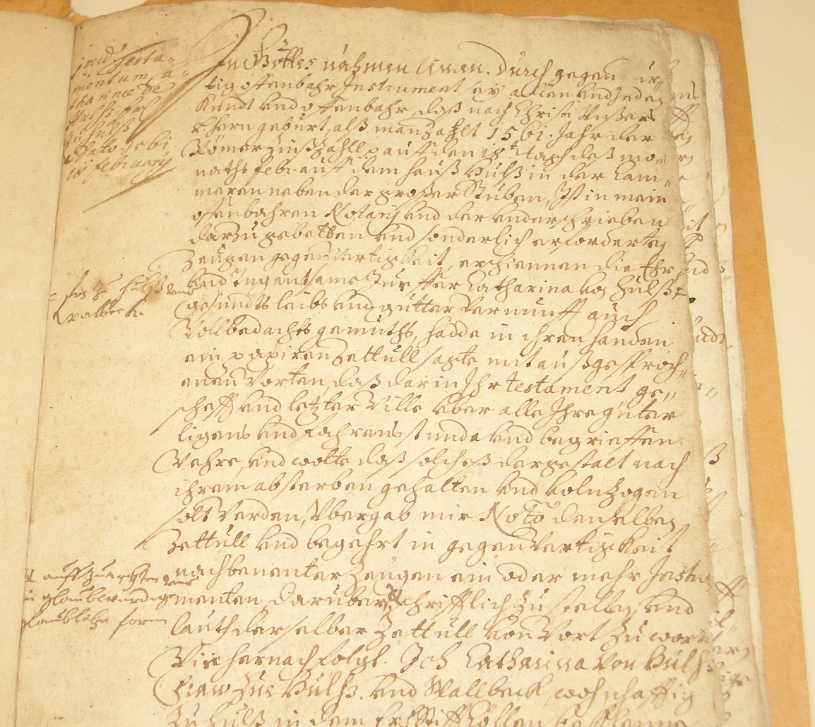 Erste Handschriftseite Testament der Catharina von Hüls